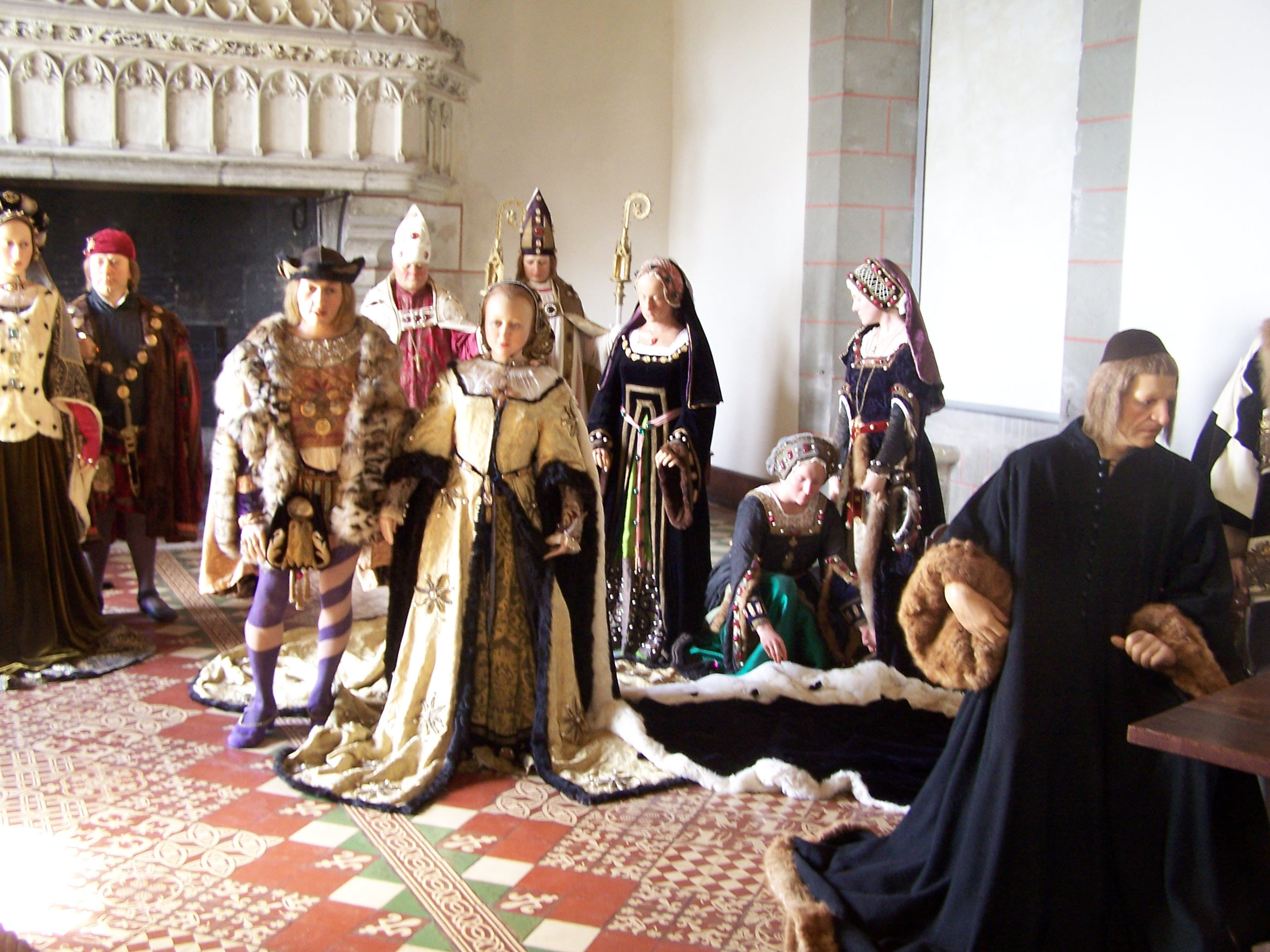 Panoptikum Langeais kastélyában